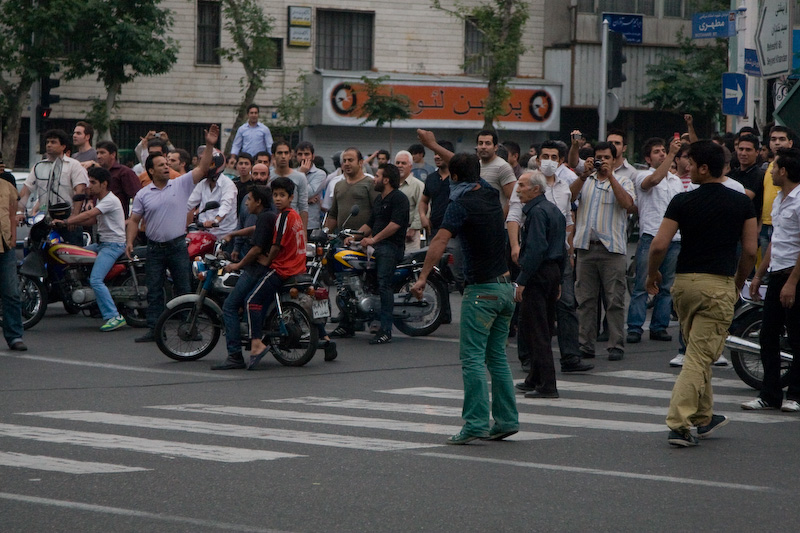 Protest in Tehran